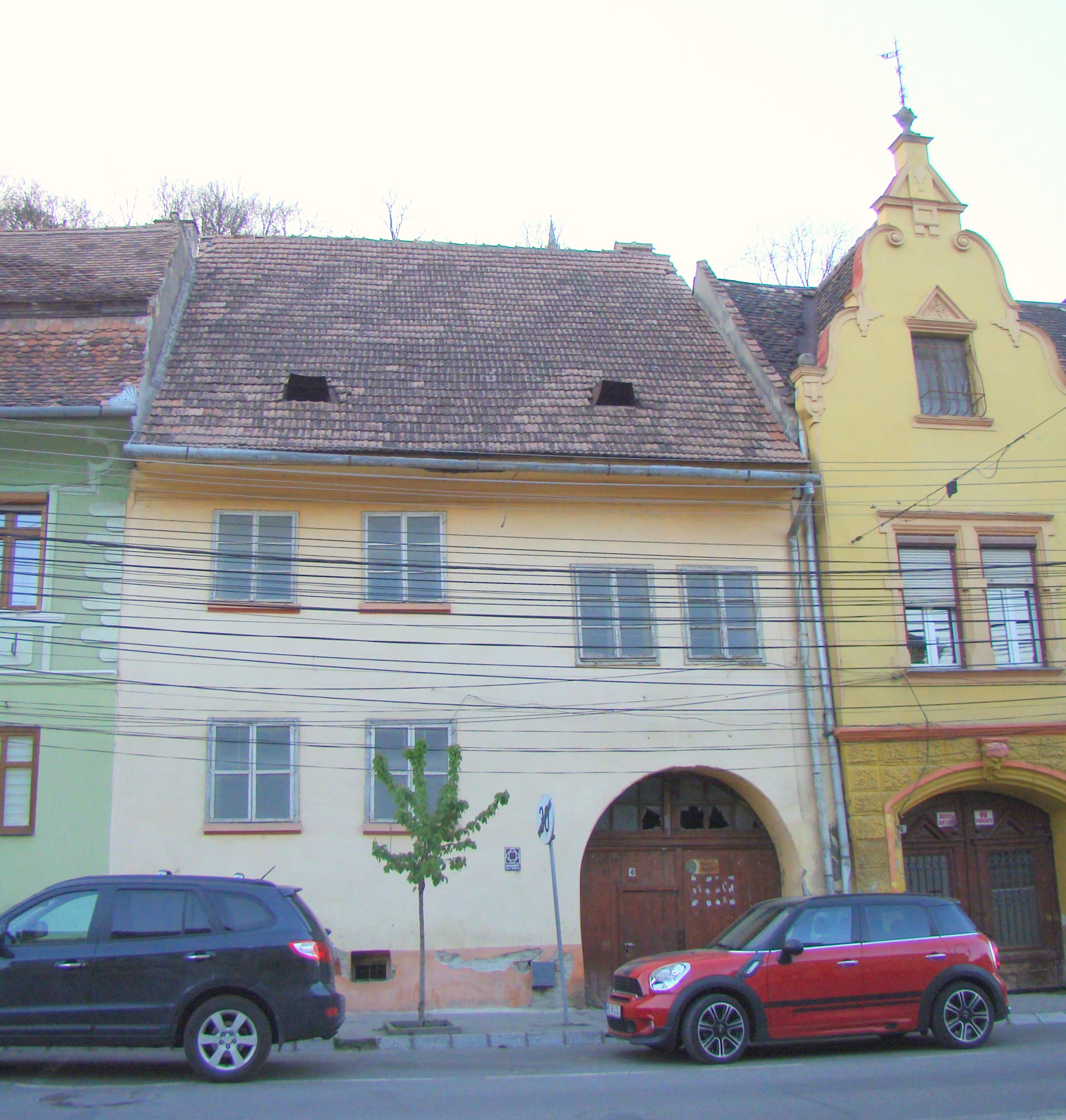 Casa Duldner, municipiul Sighișoara, str. Chendi Ilarie 6 1776, sec. XIX